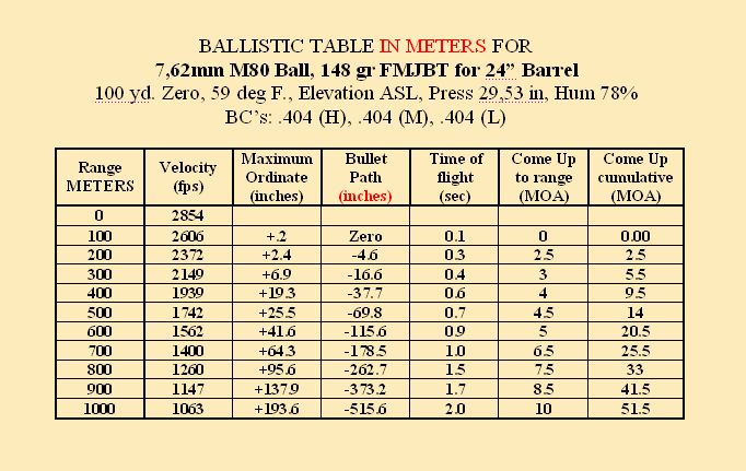 полная таблица